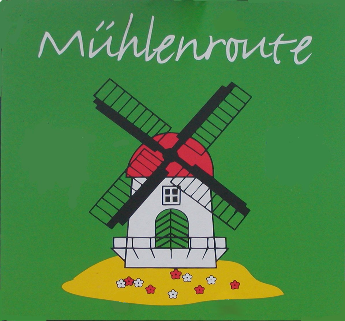 Logo der Mühlenroute